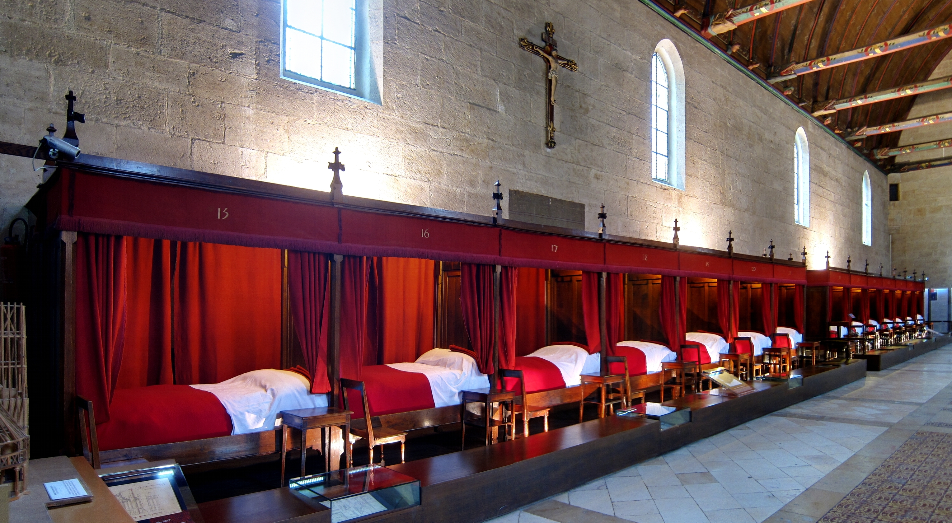 Rangée de lits dans la grande salle des pôvres de l'Hôtel-Dieu de Beaune.